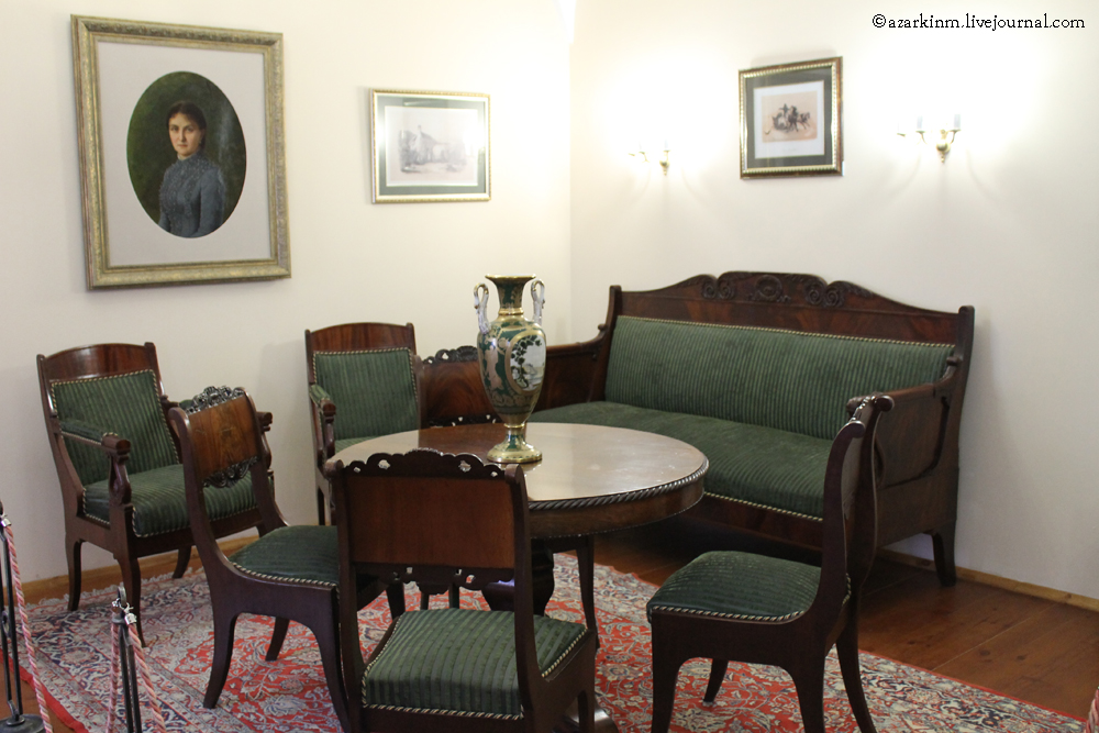 Гасціная. Побыт шляхты канца ХІХ ст. Мастацкая галерэя Міхаіла Савіцкага